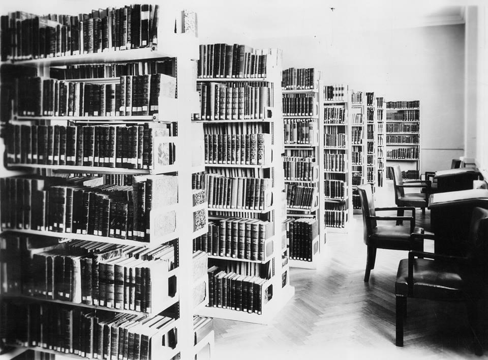 Imagen de la biblioteca pùblica de la Universidad Nacional de La Plata, año 1930. Inventario 260456.